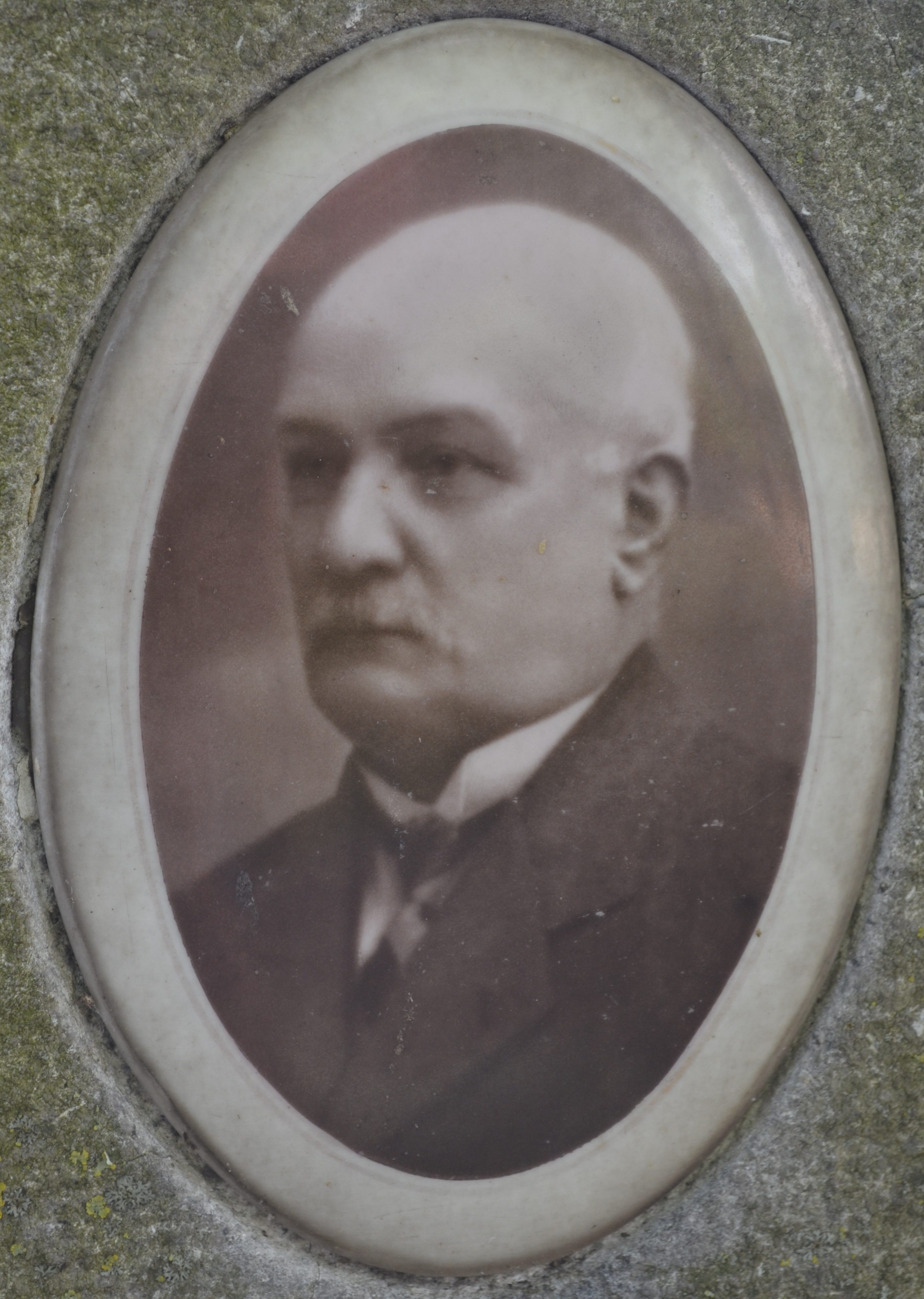 Édouard Falony (1861-1939) homme politique belge. Photo sur sa tombe au cimetière de Charleroi-Nord